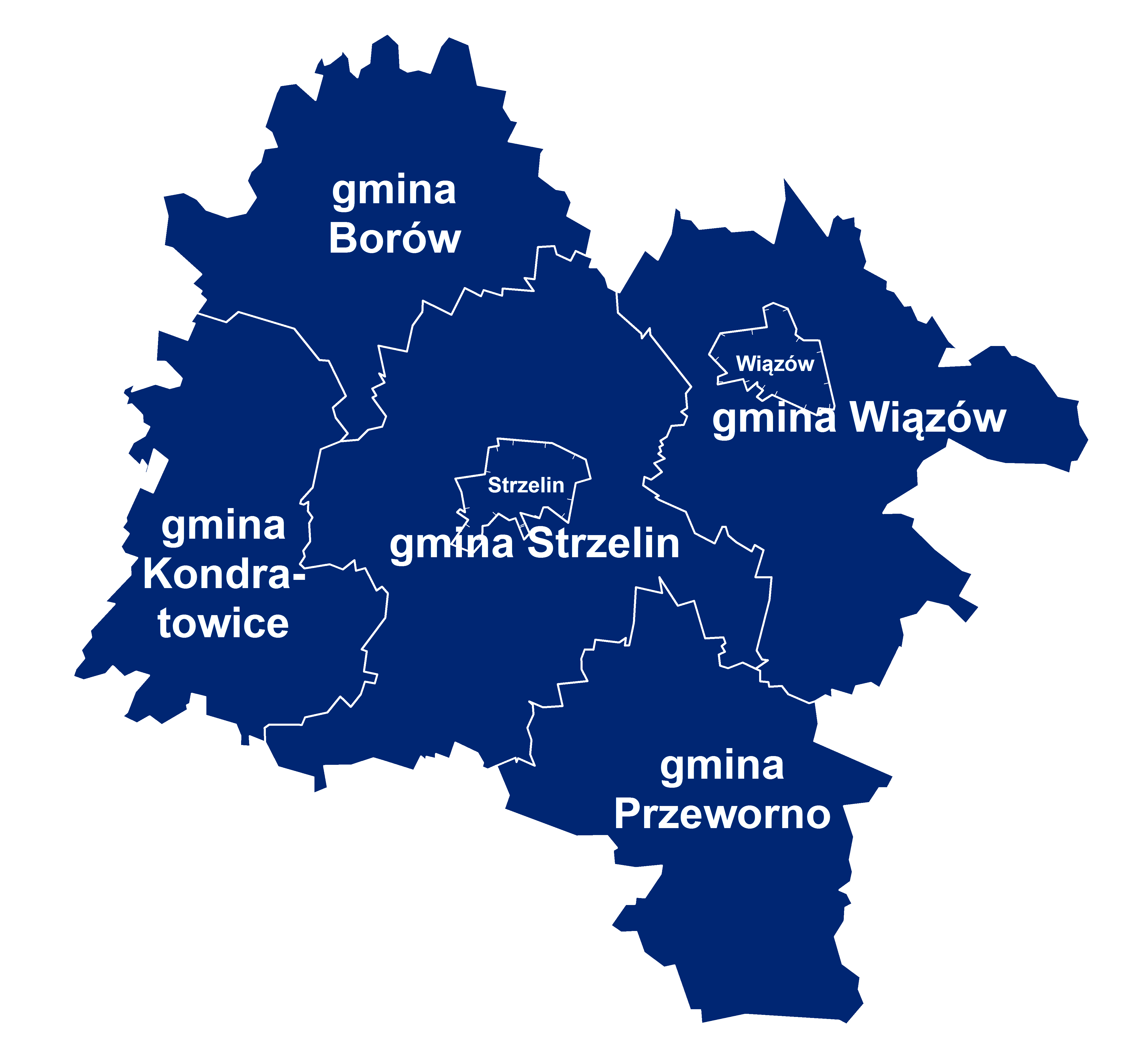 Kontury powiatu strzelińskiego z zaznaczeniem granic gmin i miast + opis